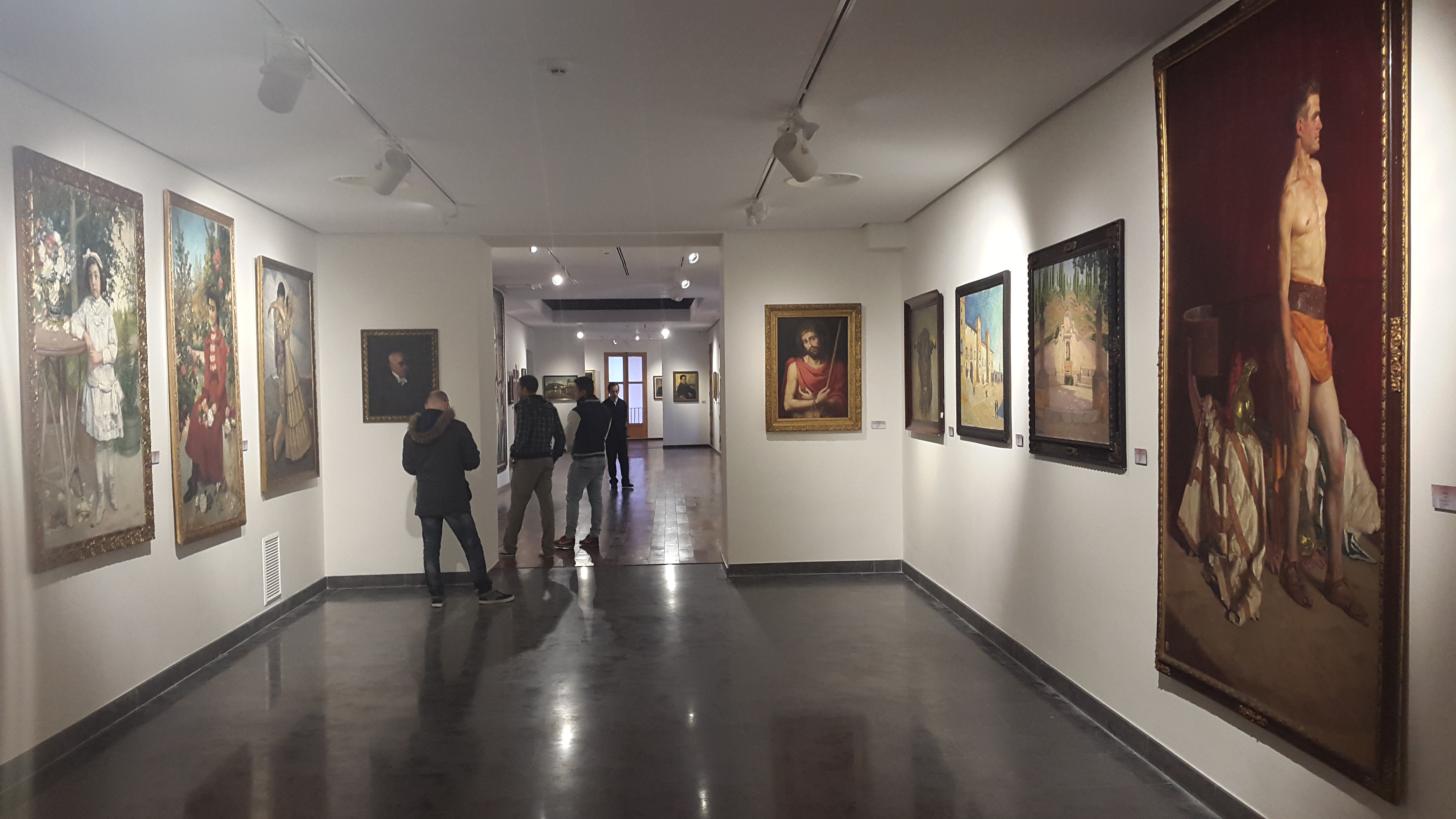 Imatge de la sala de pintors espanyols